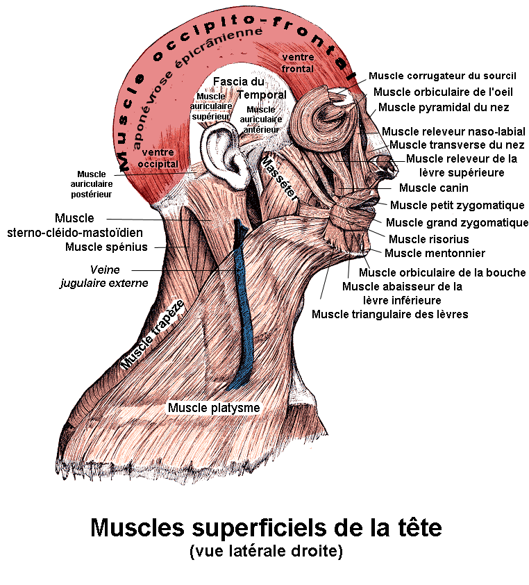 Muscle occipito-frontal. Anatomie humaine